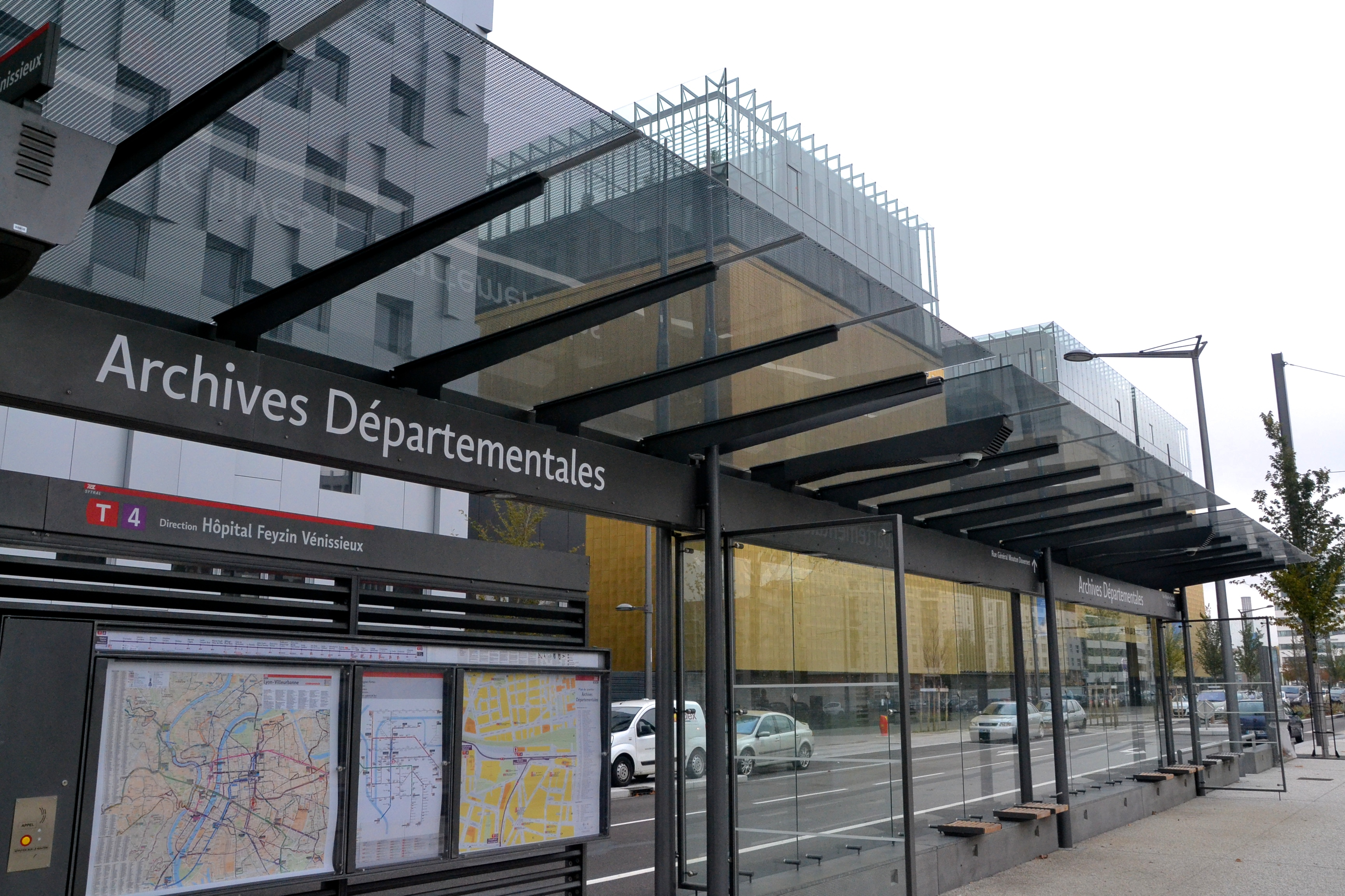 Station de tramway et Archives départementales du Rhône (Lyon, Rhône, France).